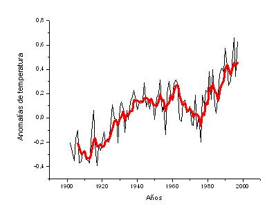 Gráfico de creación propia